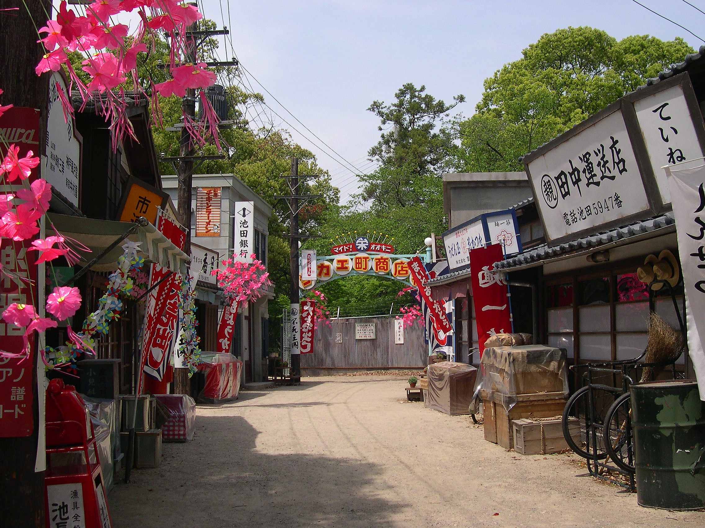 Teruteru1439r.jpg